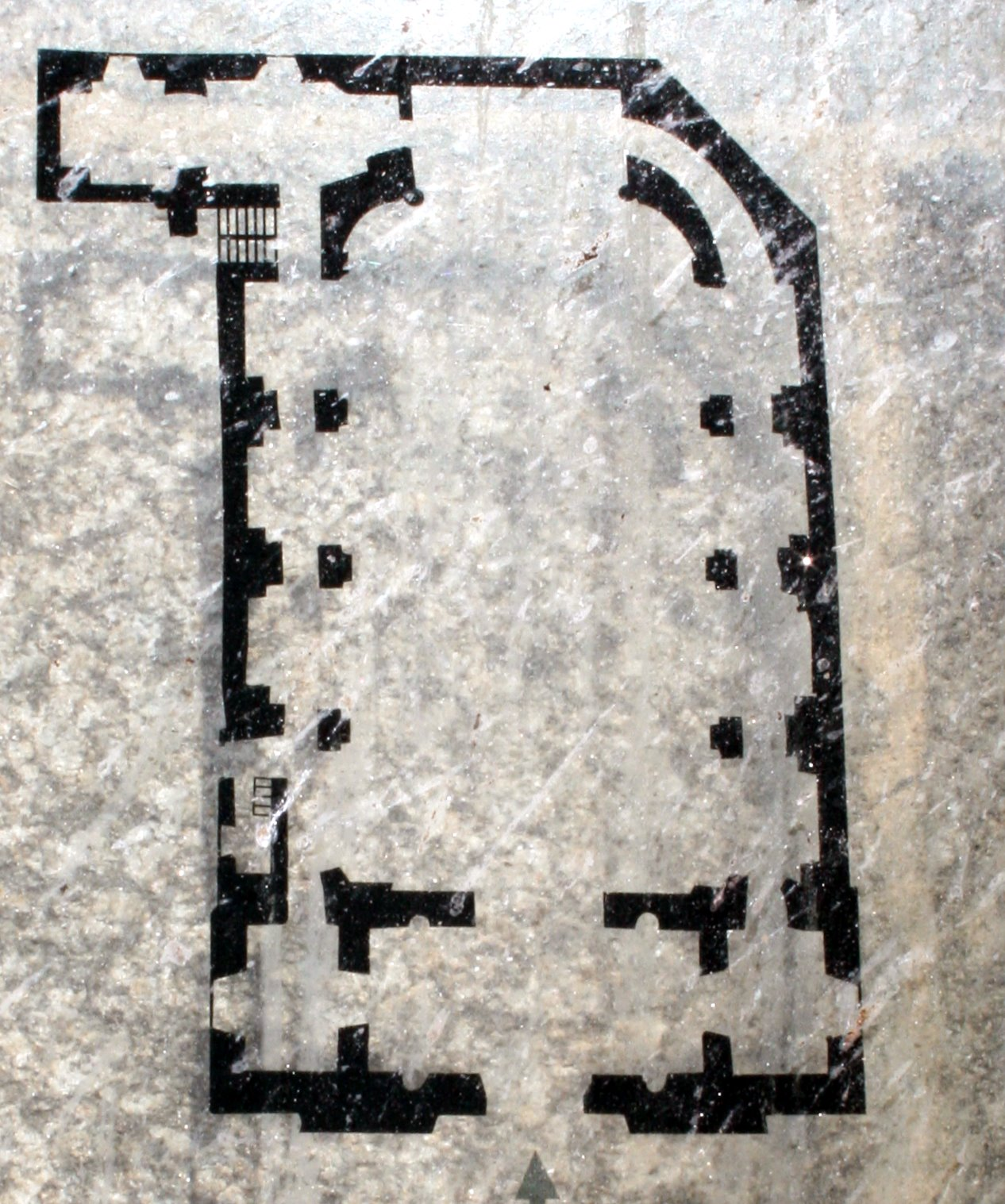 relevo da fachada da Capela das Ánimas, Santiago de Compostela Categoría:Imaxes da igrexa das Ánimas de Santiago de Compostela